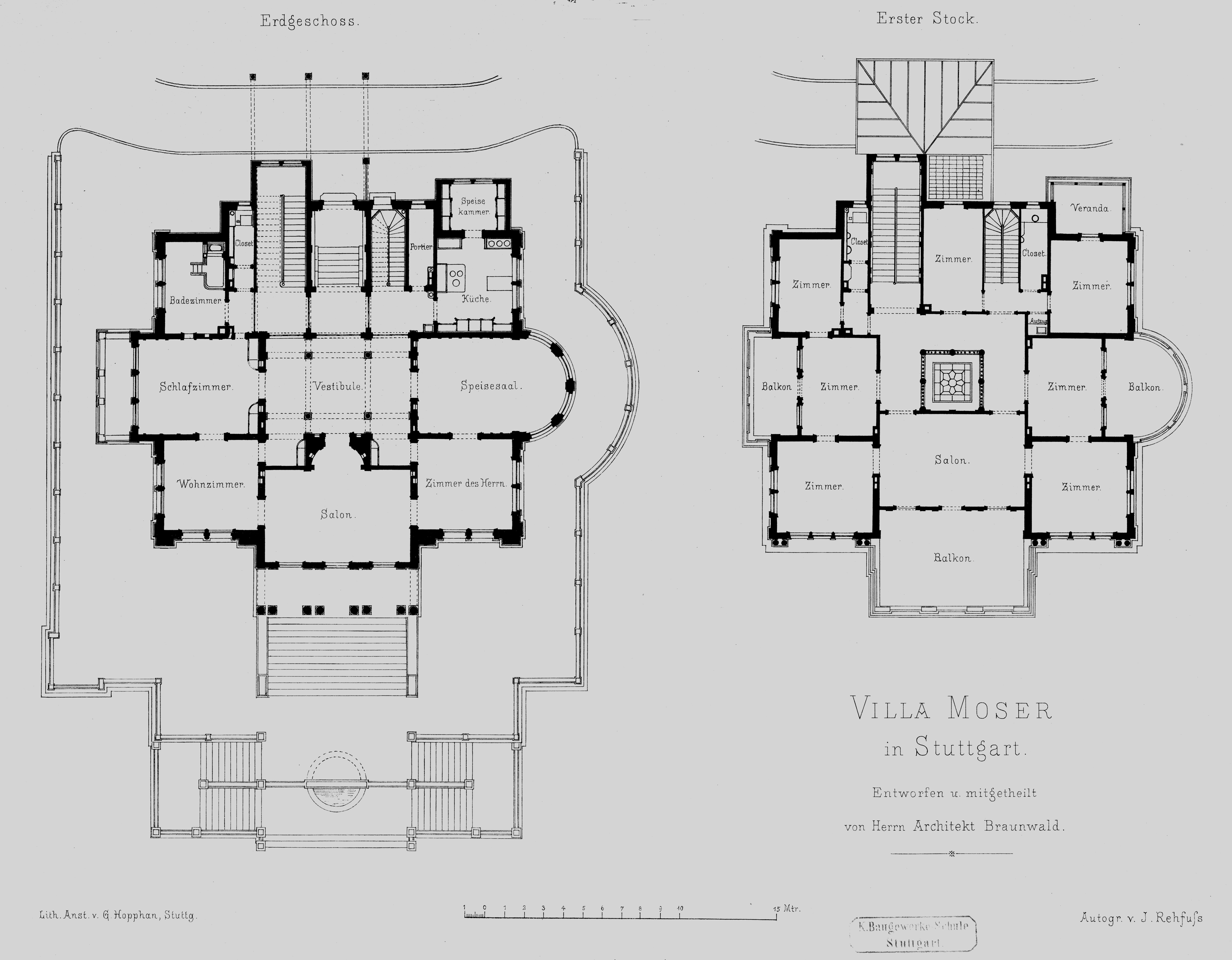 Ehemalige Villa Moser, Stuttgart, Leibfriedscher Garten, Grundriss Erdgeschoss und Erster Stock, vor 1870. Architekt: Johann Wendelin Braunwald, Baujahr: 1872-1873, Bauherr: Eduard Otto Moser (1818–1879).